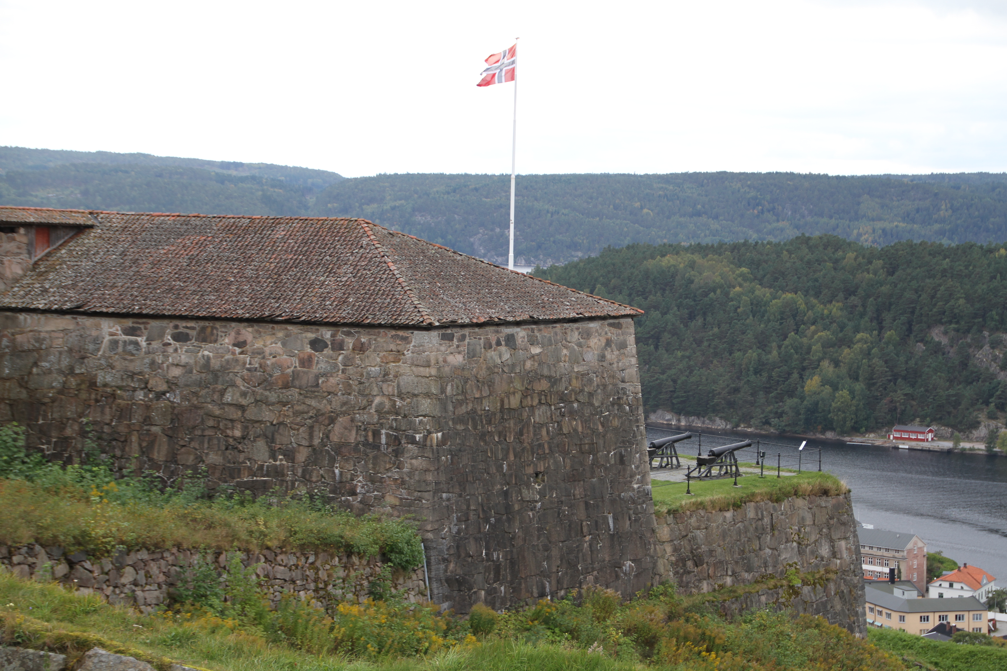 Fredriksten fortress, 18th century, in the city of Halden (Østfold), southeastern Norway.